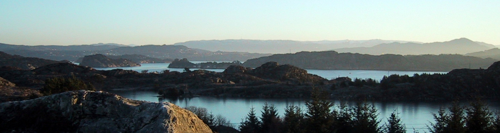 Øyen Geitanger ved Monsegaard - Foto A. Halvorsen